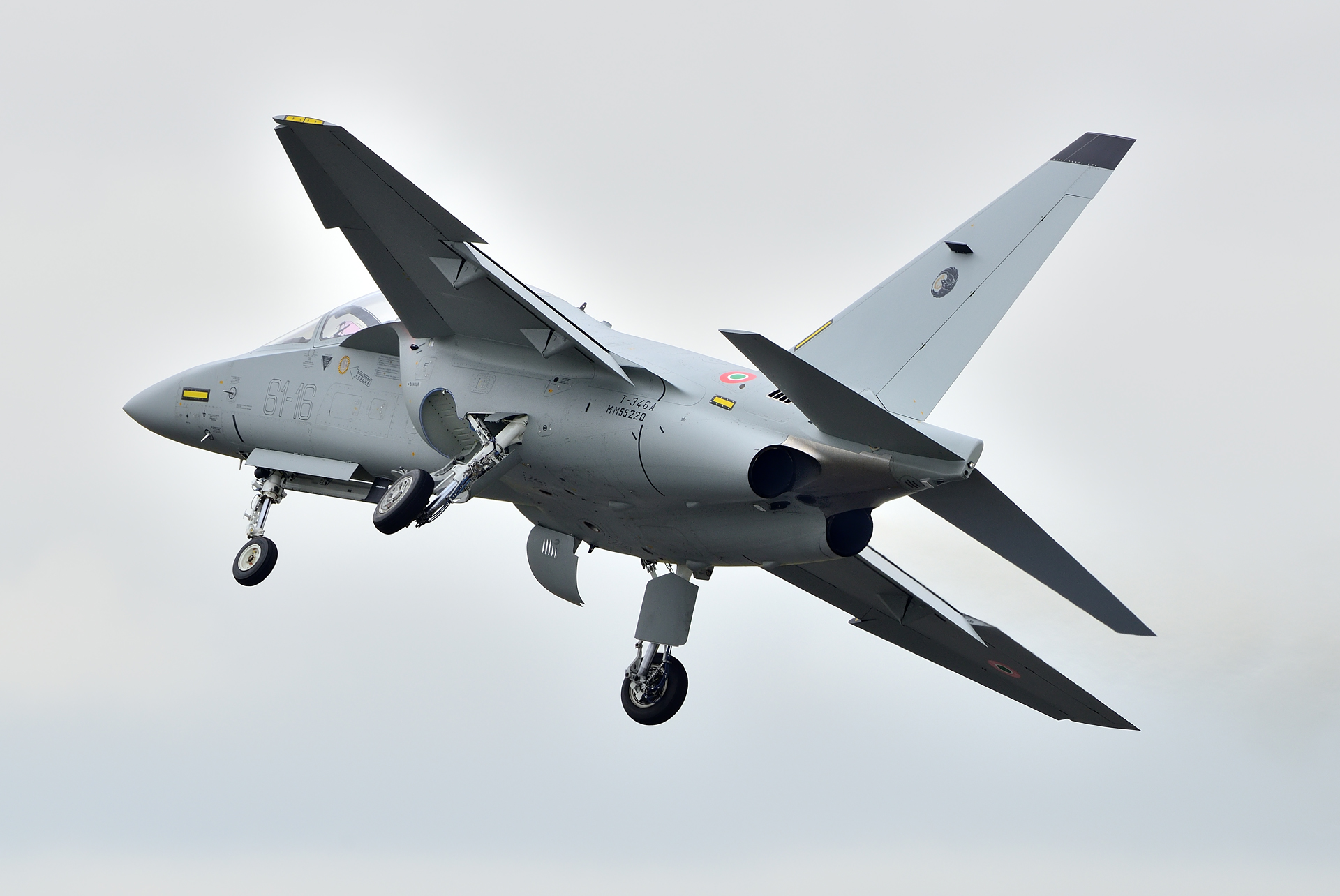 dsc_1070_36085968601_o